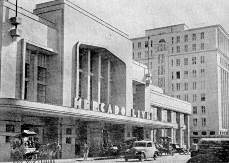 Mercado Livre em Porto Alegre, Brasil, em torno de 1930